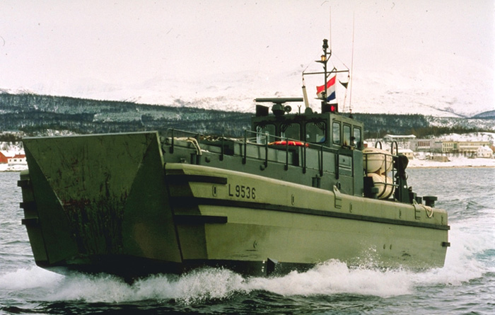 Landingsvaartuig LCVP MK III, L9536, bouwjaar 1990